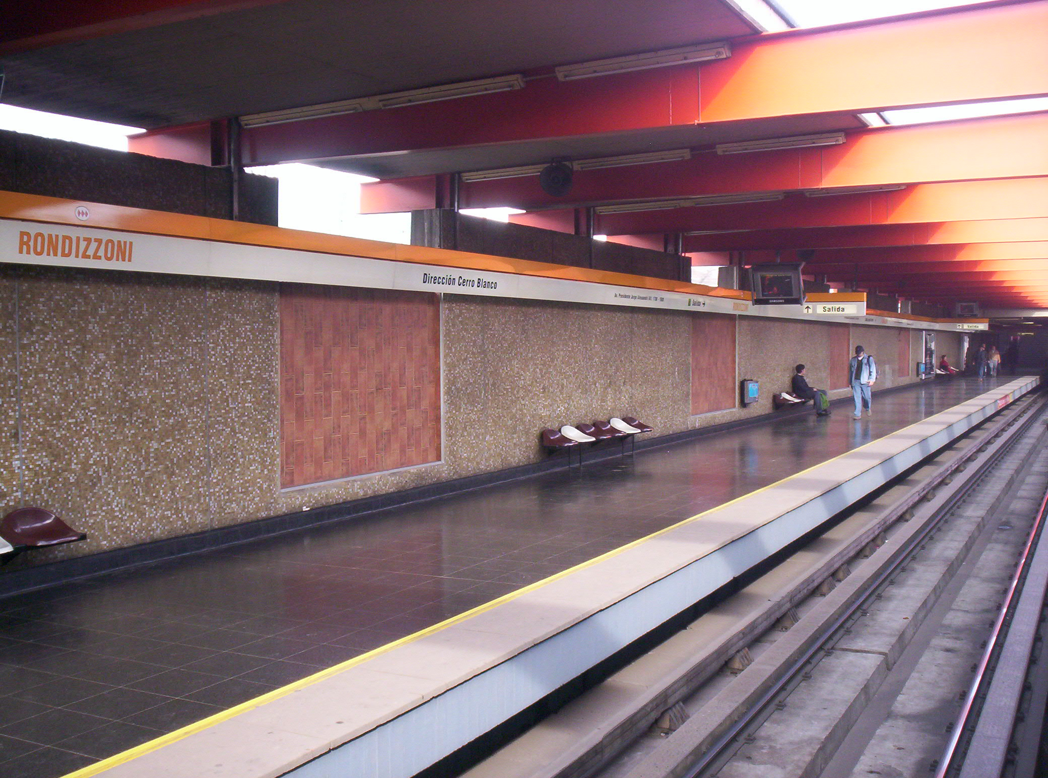 Estación Rondizzoni del Metro de Santiago, por Usuario:Der schöne Tod.